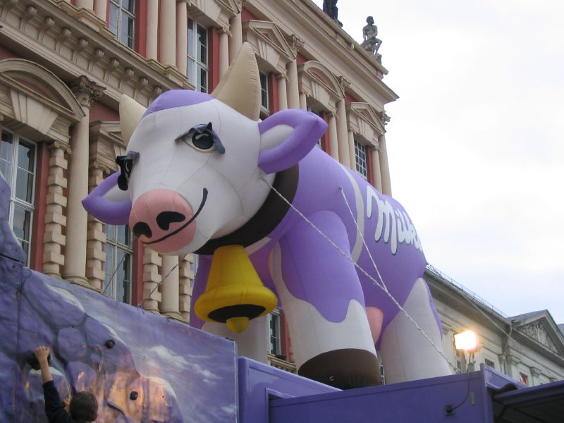 Milka in der Breiten Straße Potsdam